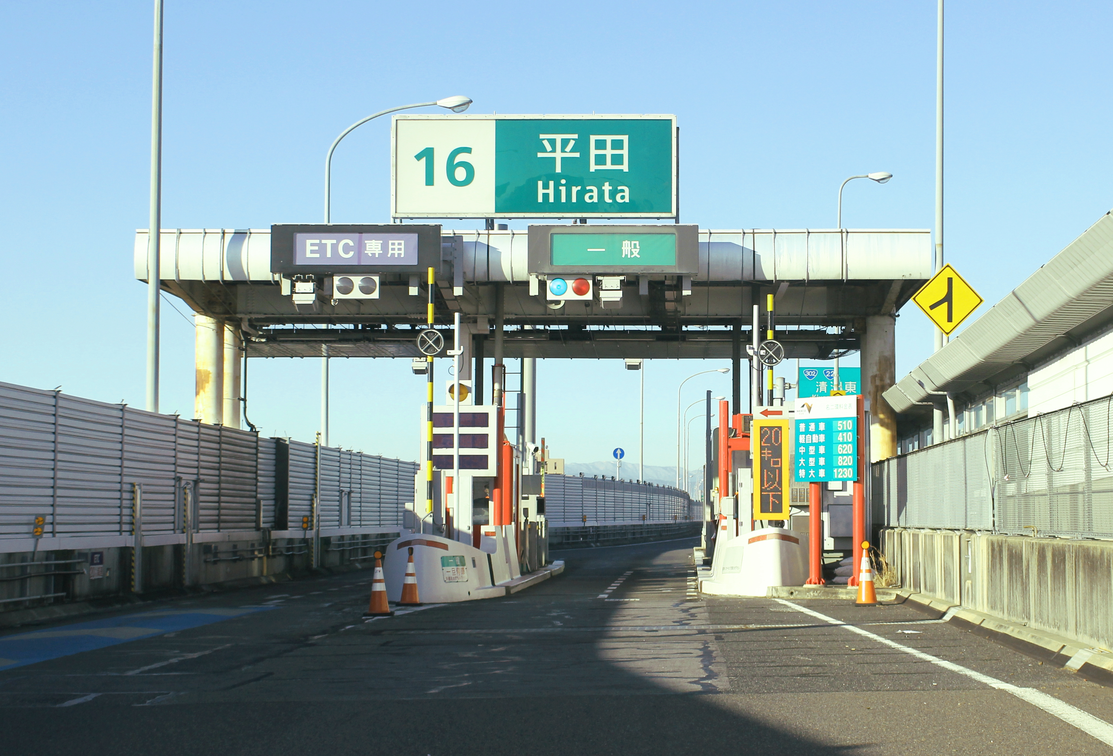 名二環 平田インターチェンジトールゲート